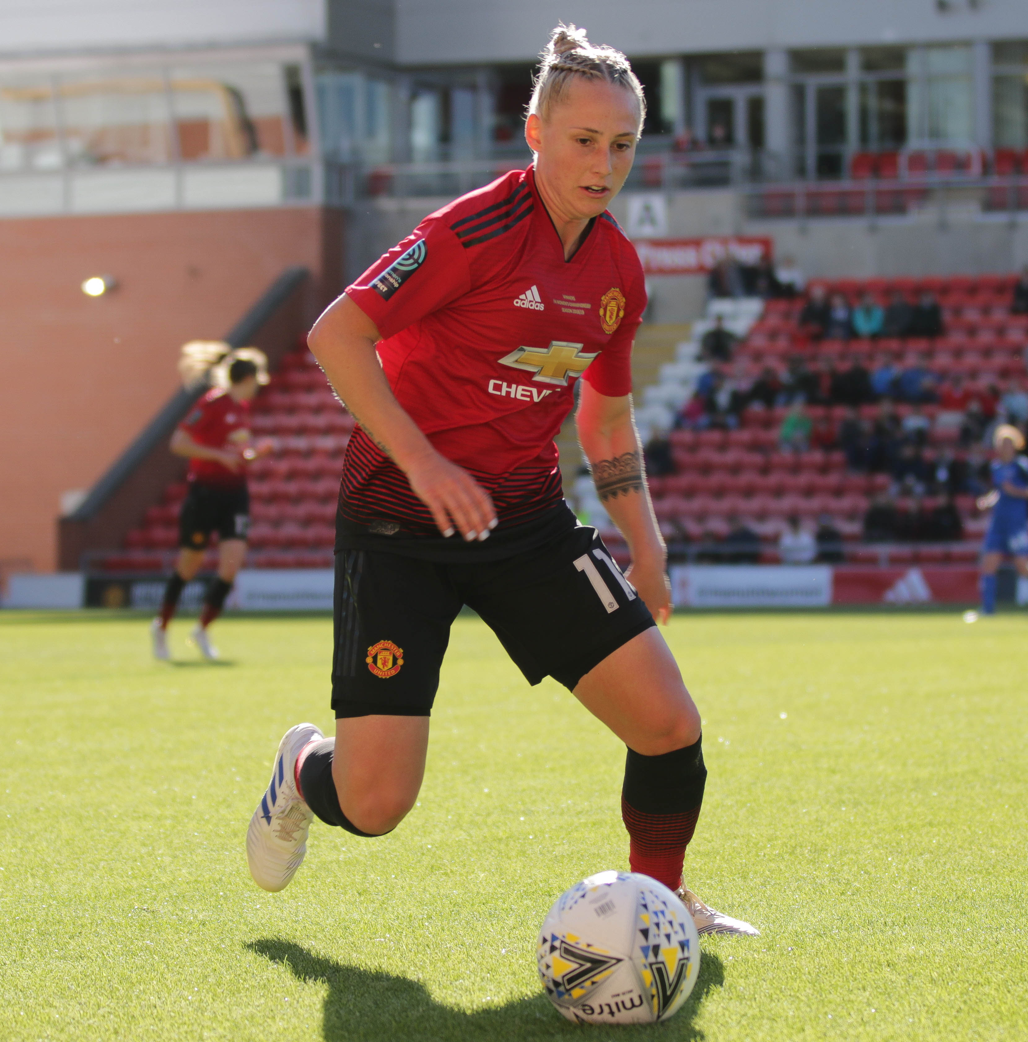 Man Utd Women 5 Lewes FC Women 0 11 05 2019-319-2.jpg